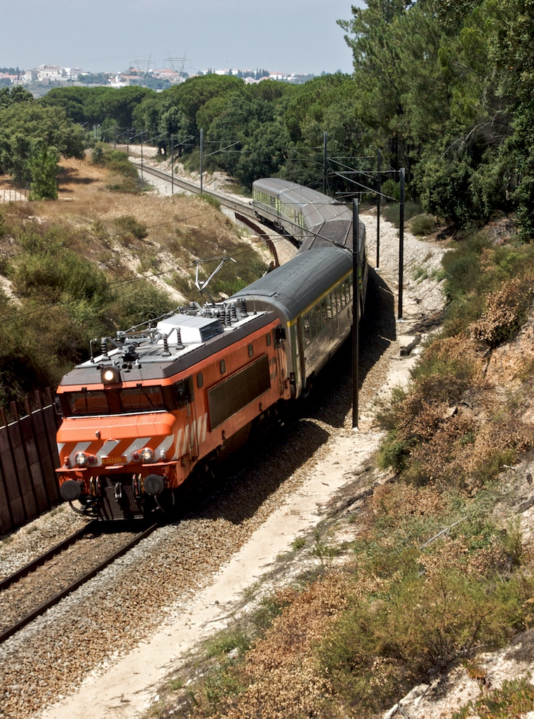 Tipo: Comboio Intercidades 572 [Lisboa • Oriente - Faro] Local: Alcácer do Sal [Linha do Sul, PK 82] Data e hora: 31 de Julho de 2008 [14h40] Material: Locomotiva 2628 + 5 carruagens (1 Corail + 4 Sorefame Renovadas)